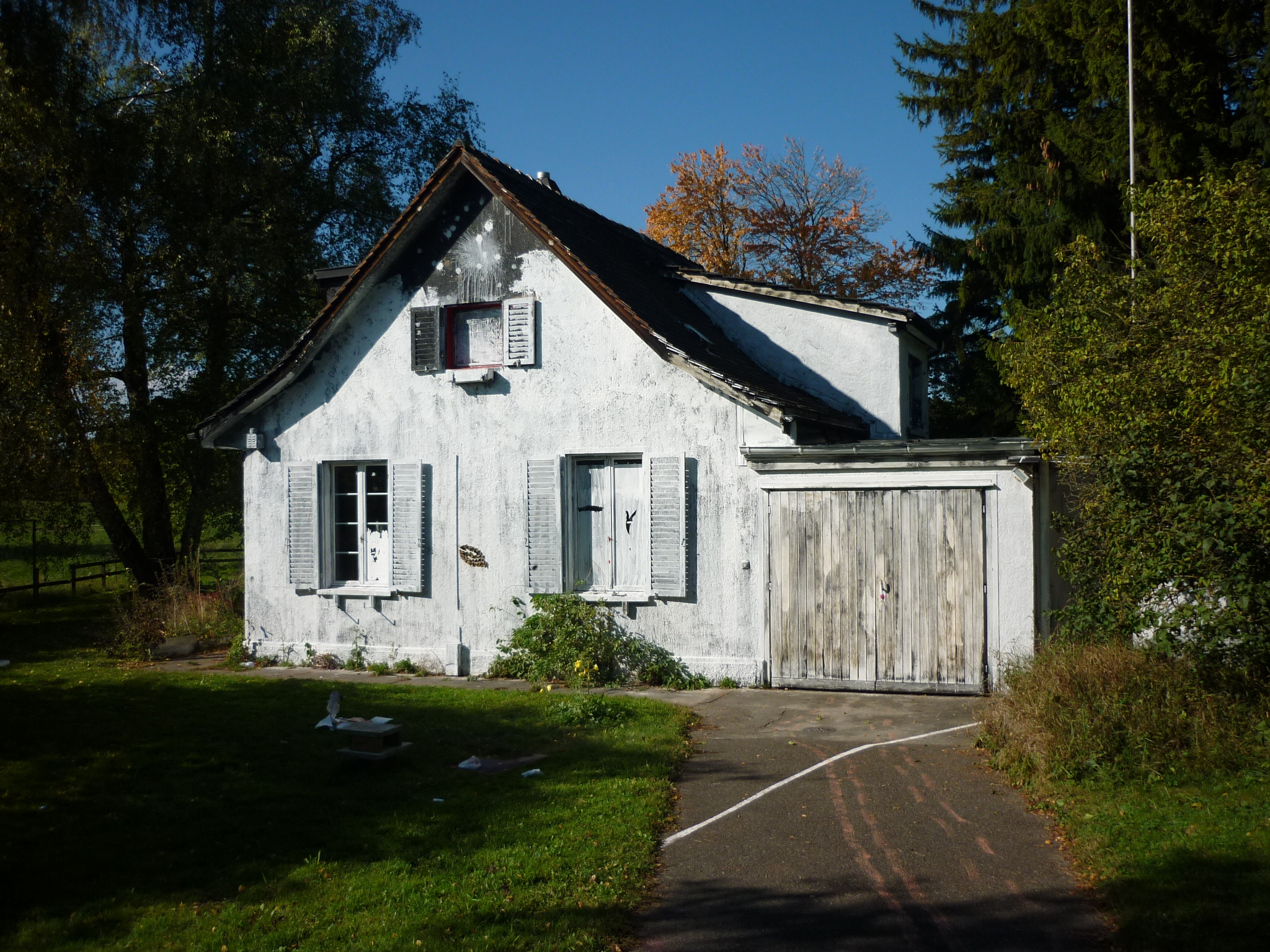 Radiosender Hönggerberg 1924-1930, Zürich, Schweiz